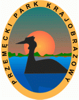 Logo Przemęckiego Parku Krajobrazowego.